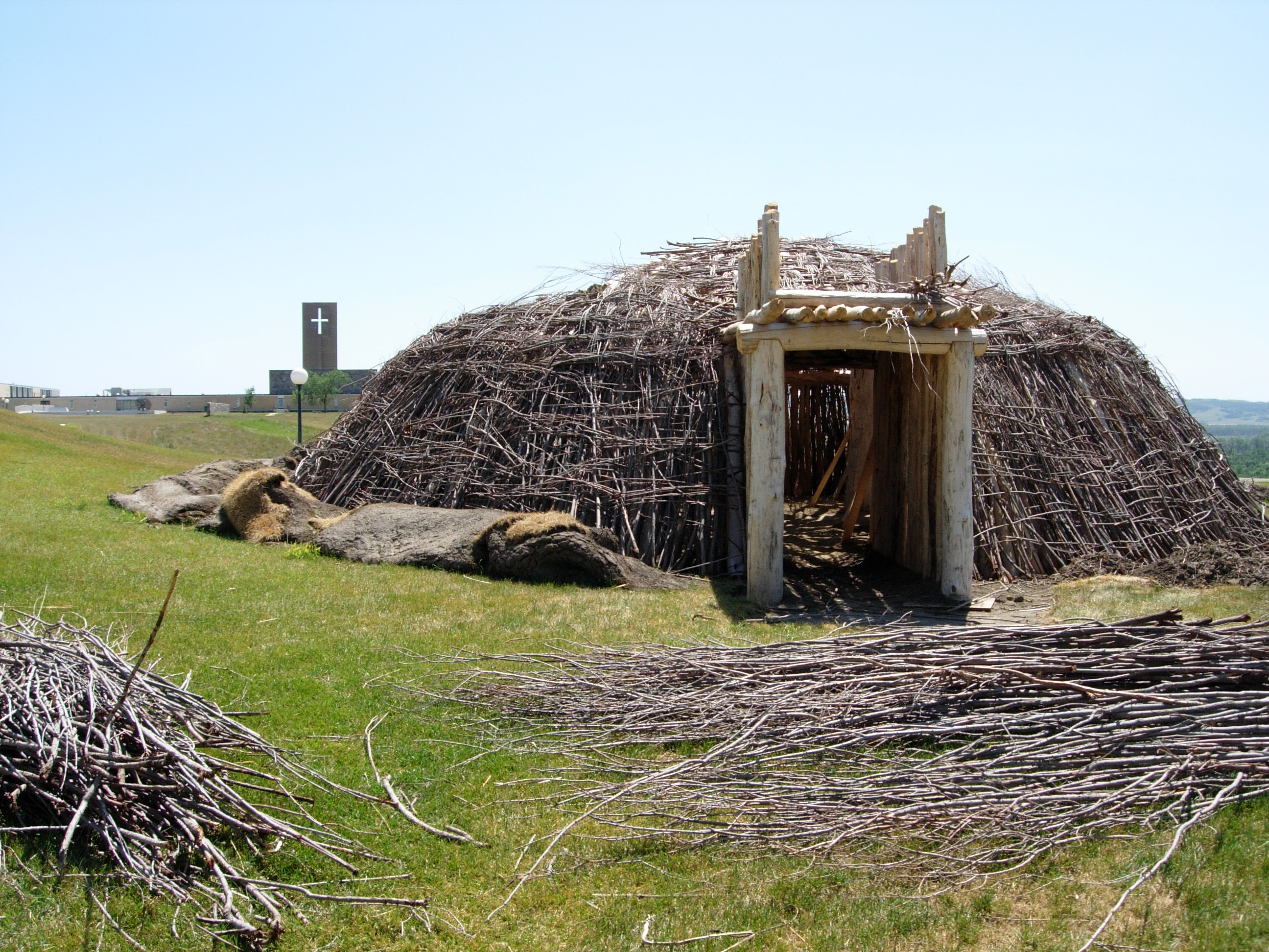 Mandan